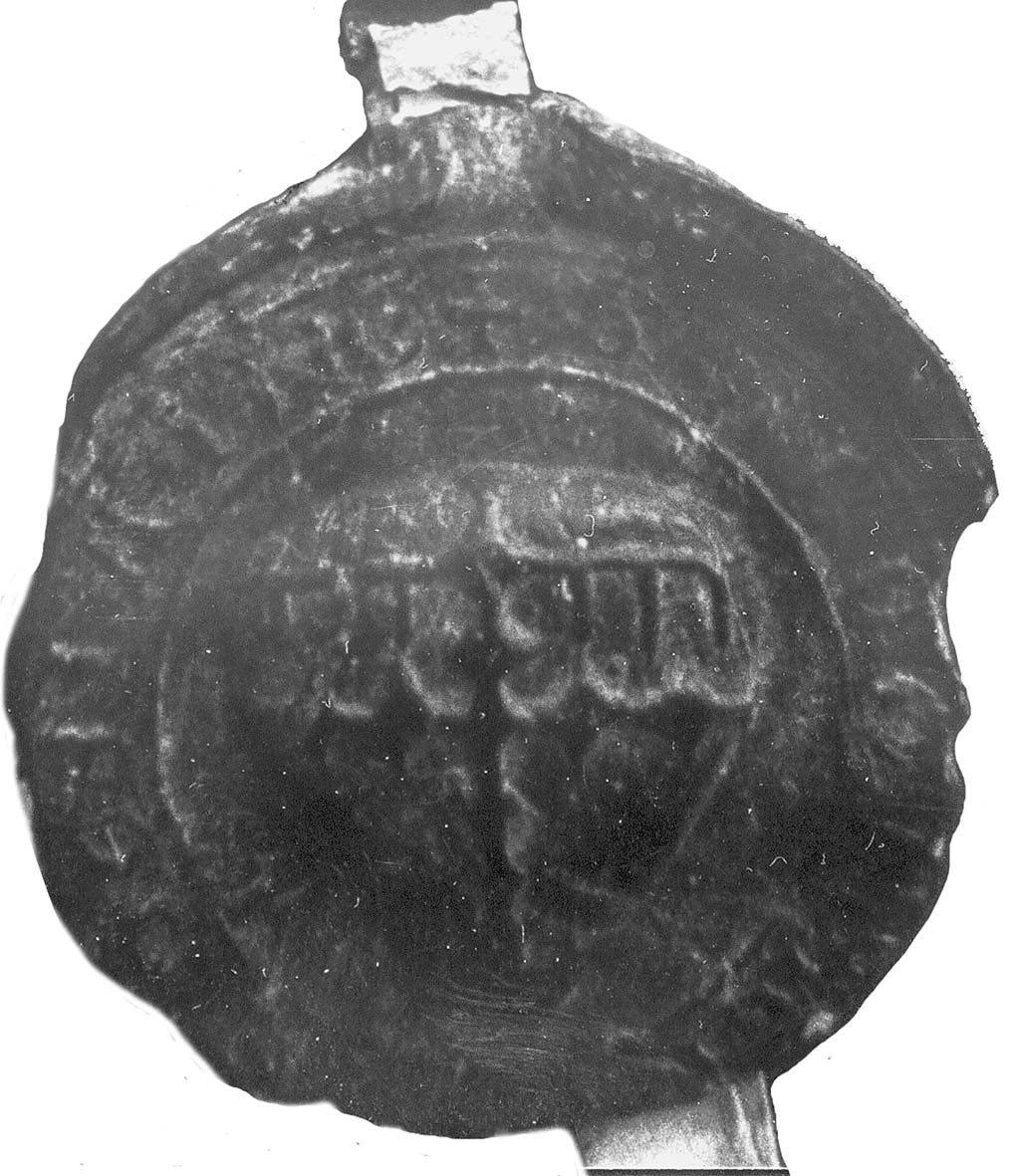 Sceau de Brognart de Denain sur un parchemin en date de juin 1229 (A.D. Nord, 59 H 29 pièce 128)